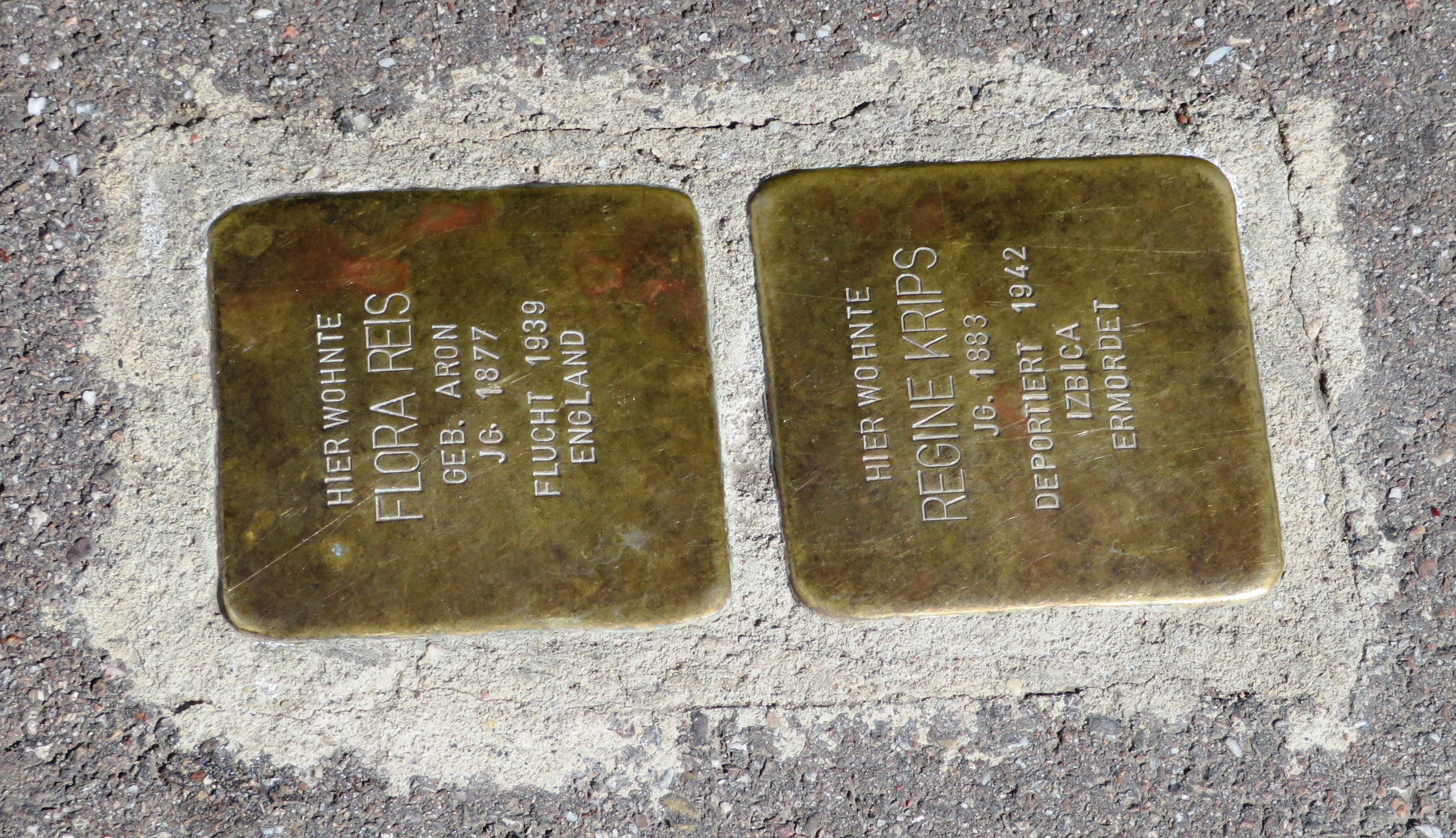 zwei Stolpersteine in Heilbronn